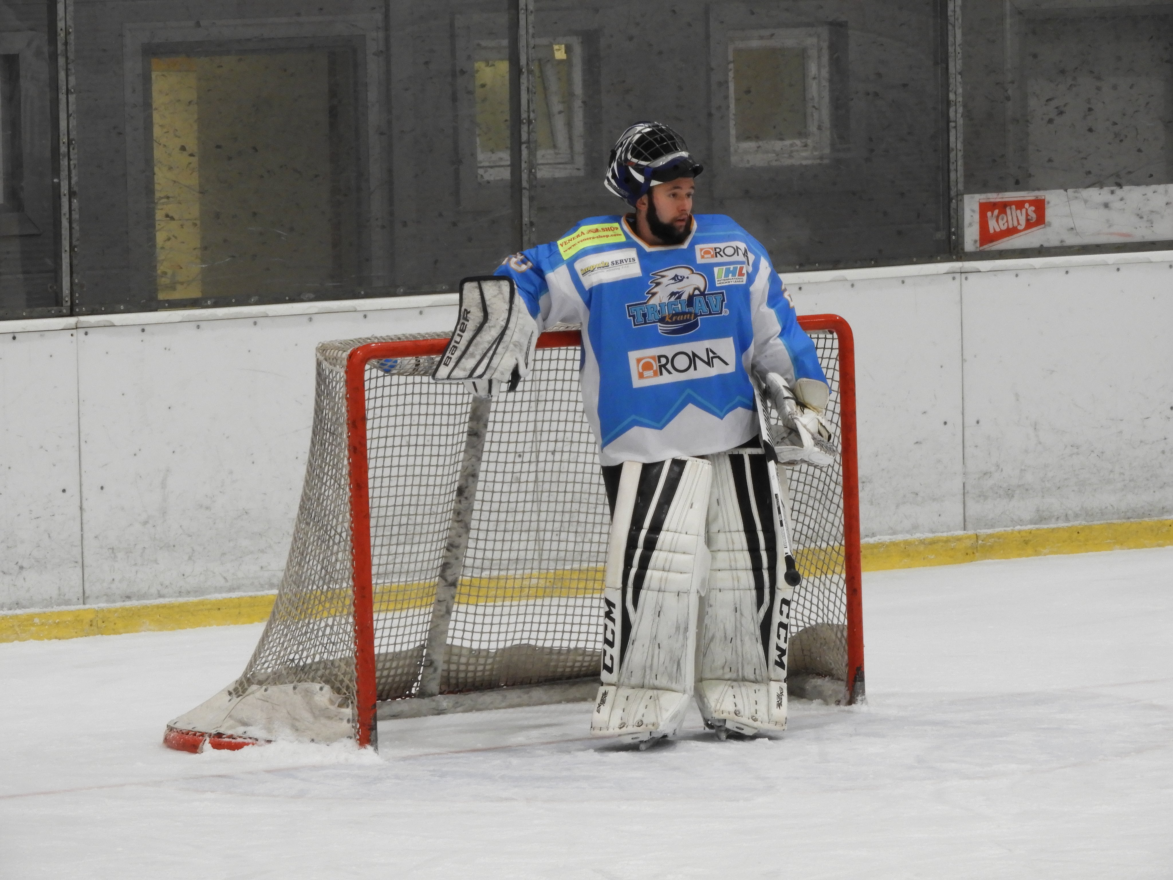 Hokejski klub Triglav Kranj, Uroš Plavc vratar, Člani 2017